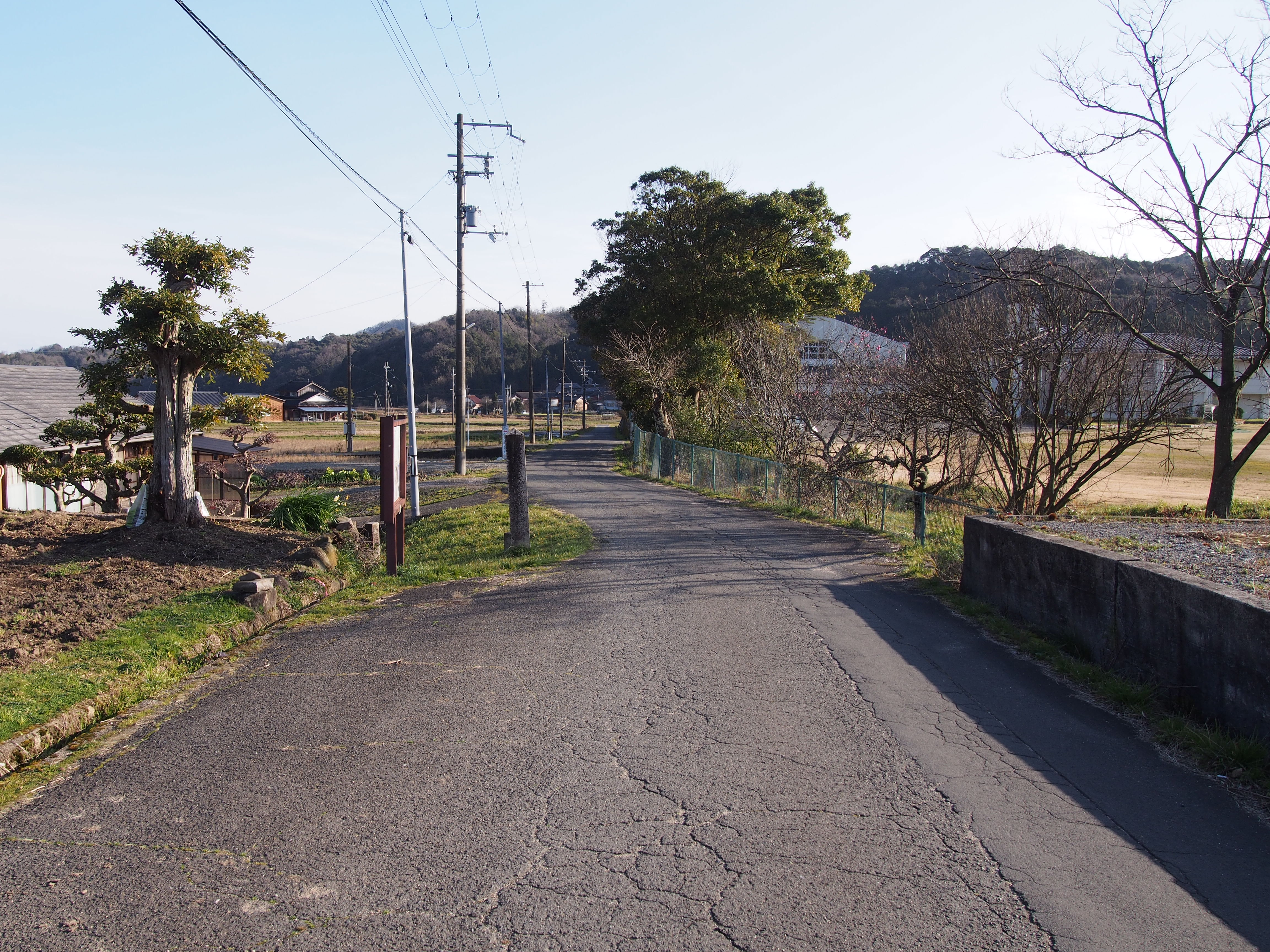 郷村断層(小池)京都府京丹後市網野町郷 昭和2年3月7日北丹後地震(丹後震災)により発生した断層。南側から撮影。